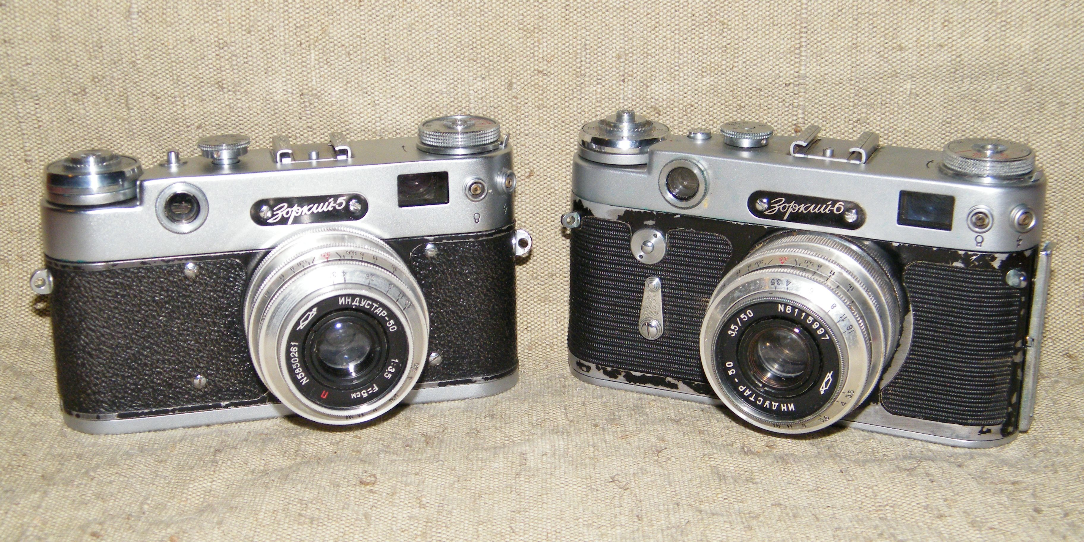 Зоркий-5 и Зоркий-6